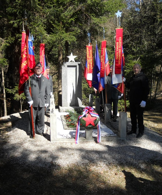 Rakitovec. Vsakoletna počastitev borcev, ki so leta 1944 padli v bitki z okupatorji.